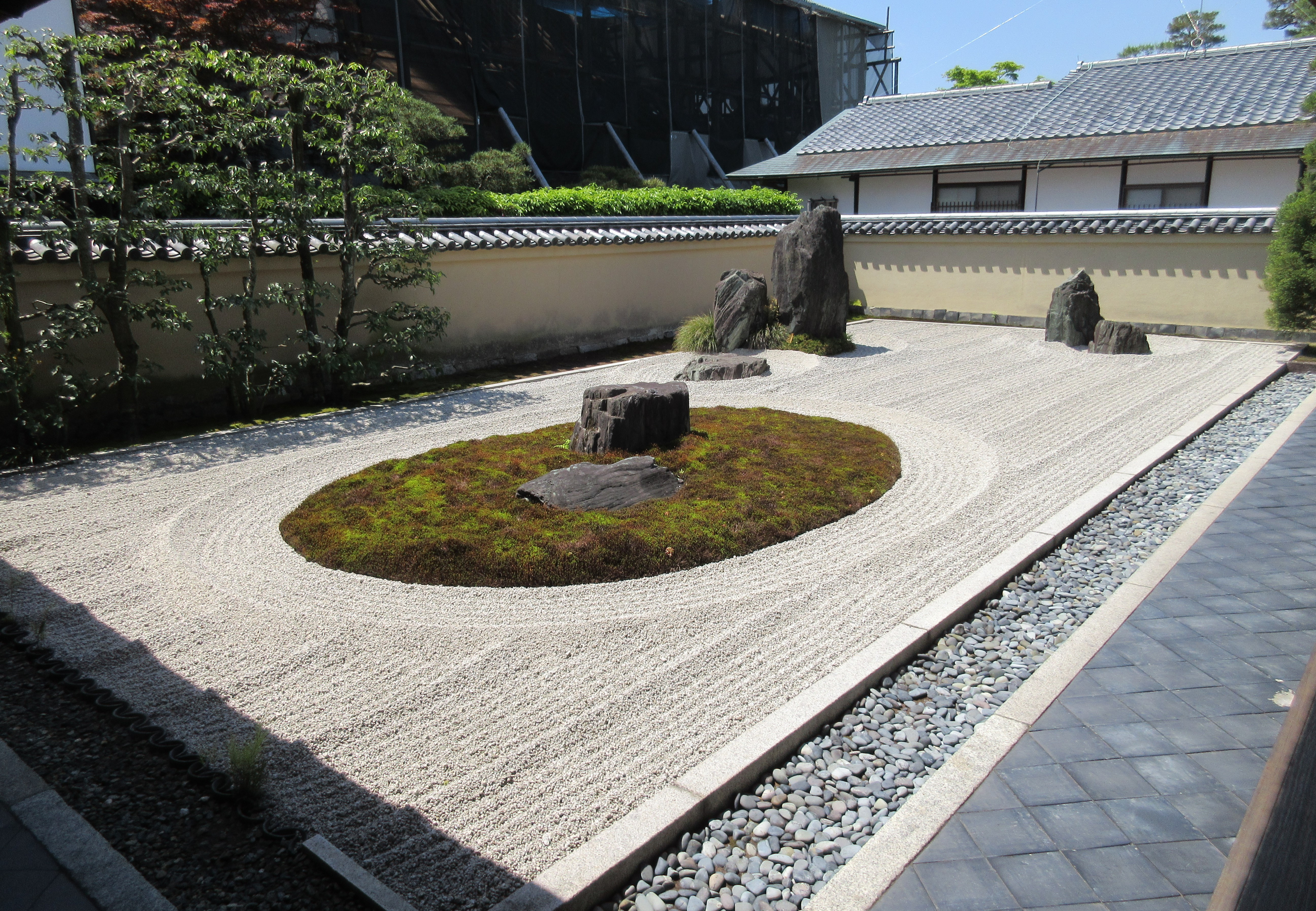 龍源院庭園